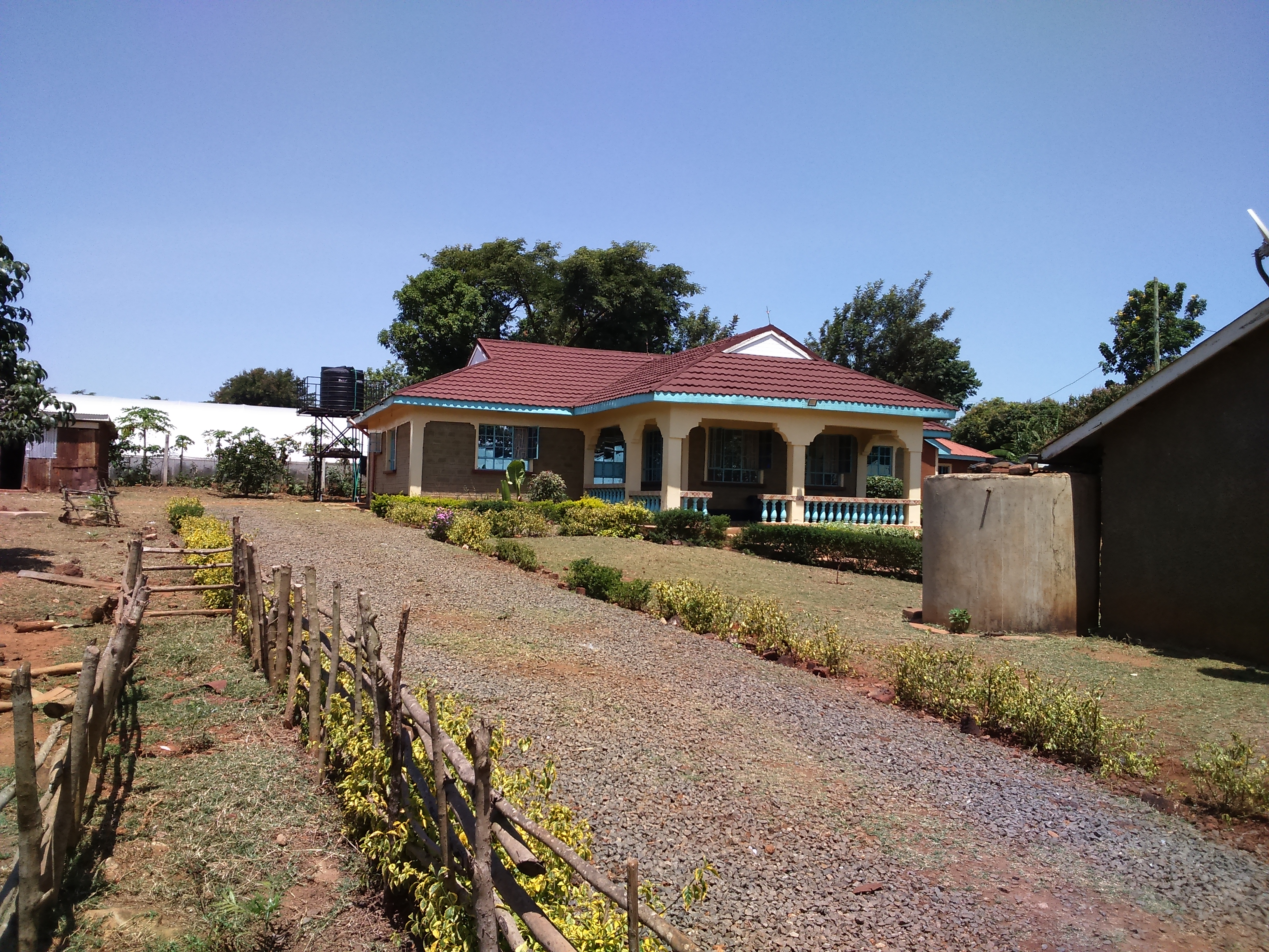 La maison de Sarah Ogwel